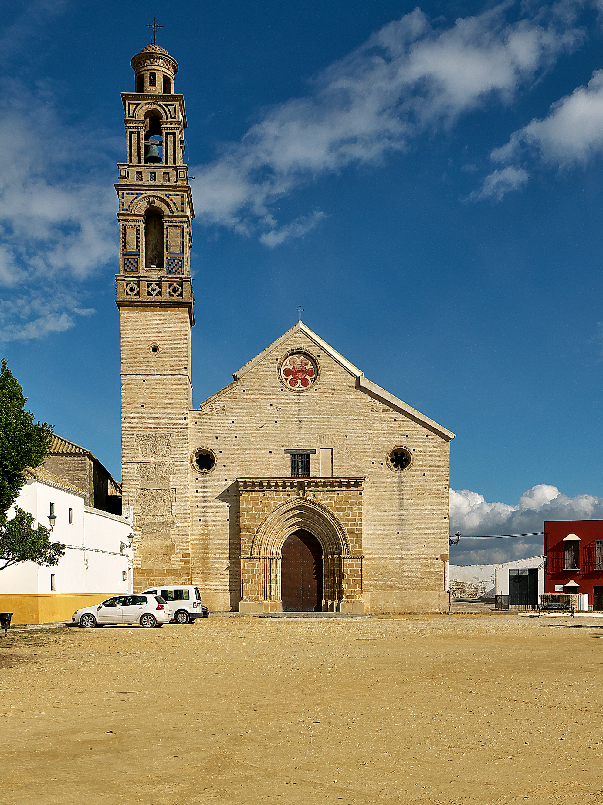 Hastial de los pies de la primitiva iglesia (1390) de los Duques de Arcos.